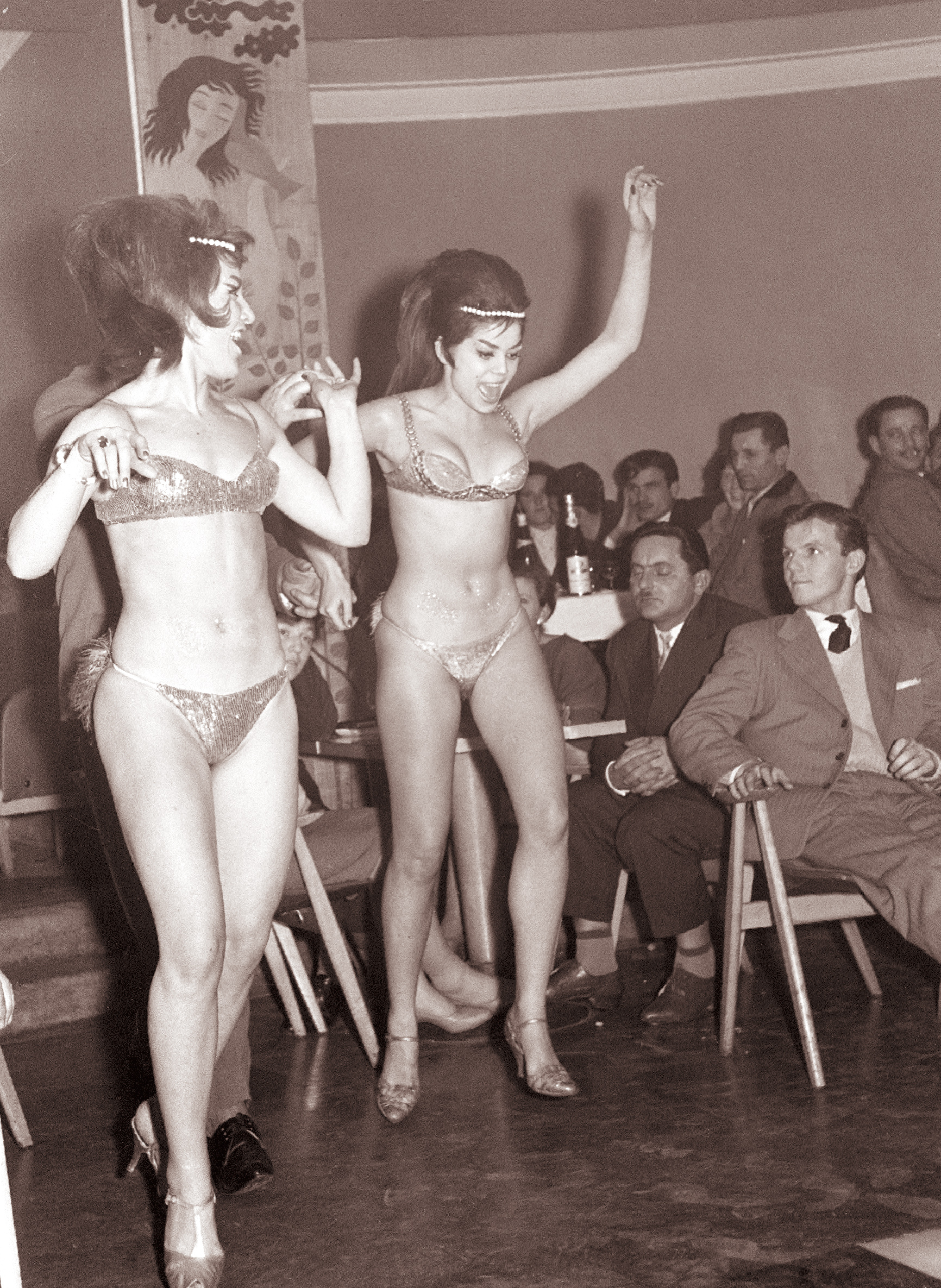 V mariborskem nočnem zabavišču nastopajo jugoslovanski artisti